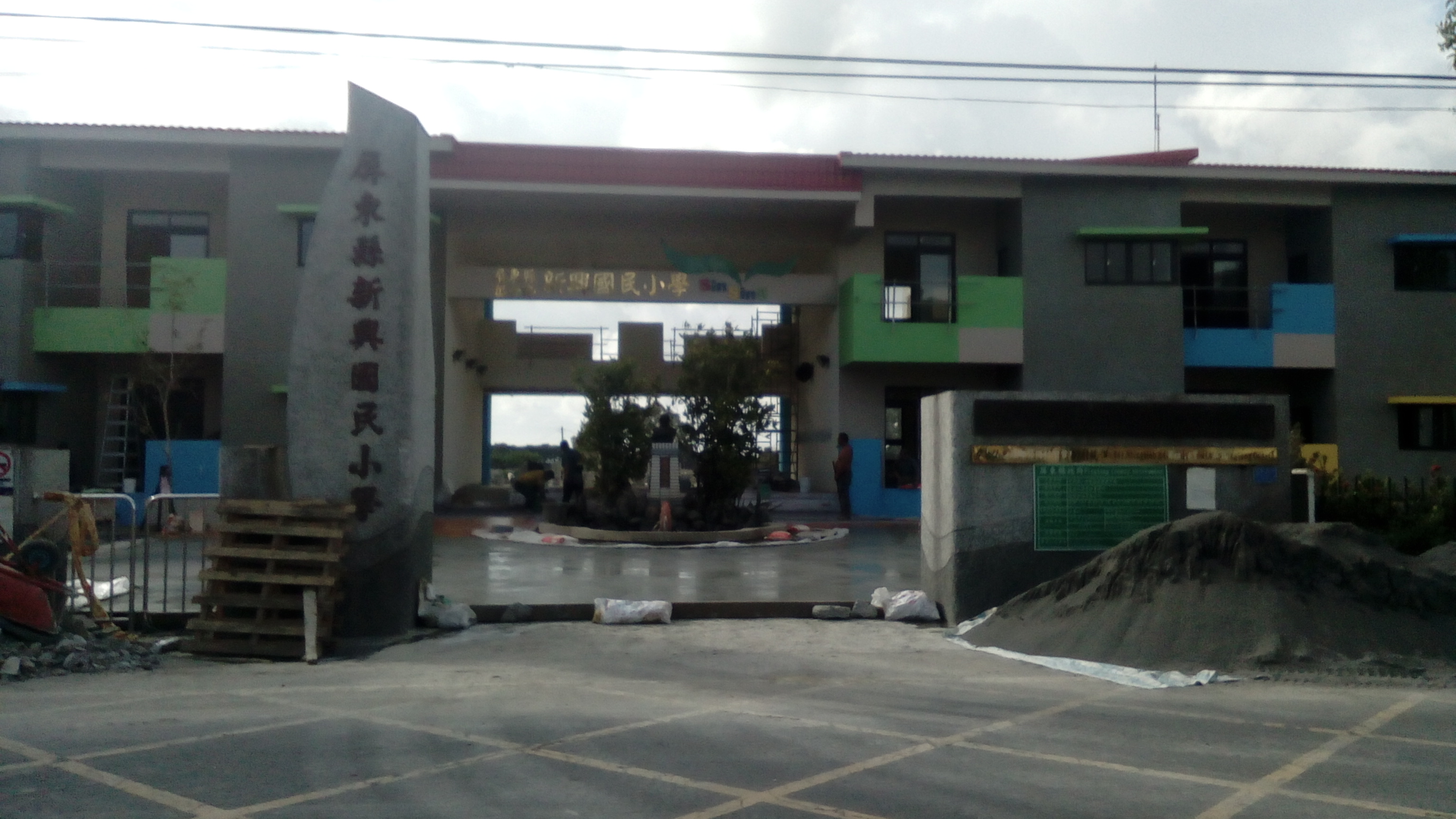 位於萬丹後村一帶 屏縣府為營造歡樂學習、愛與包容的氛圍 於2019年決議將校門改頭換面 估計2020年夏季竣工